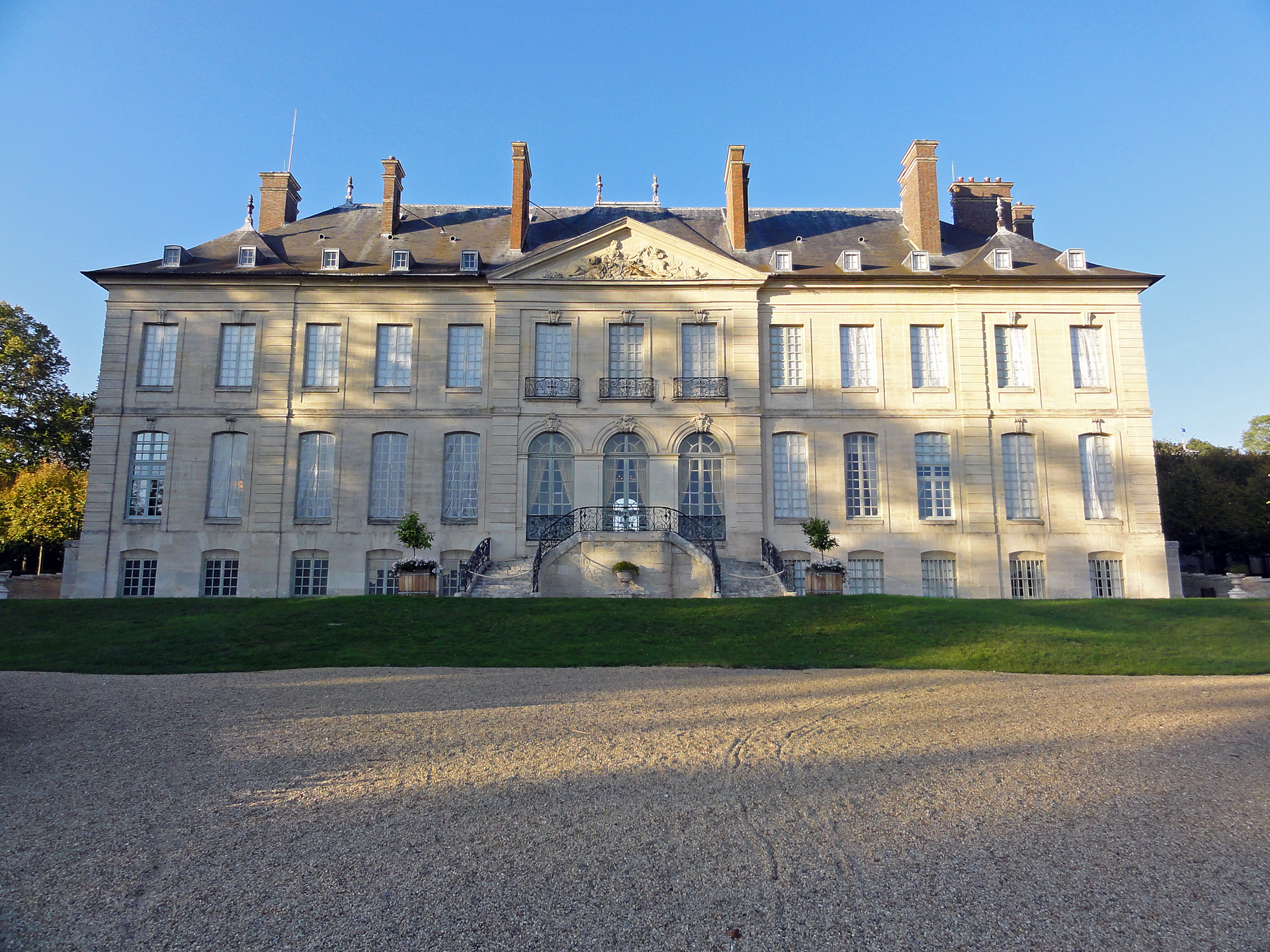 Façade sud du château du Haut. Domaine de Villarceaux, Chaussy, Val-d'Oise, France.